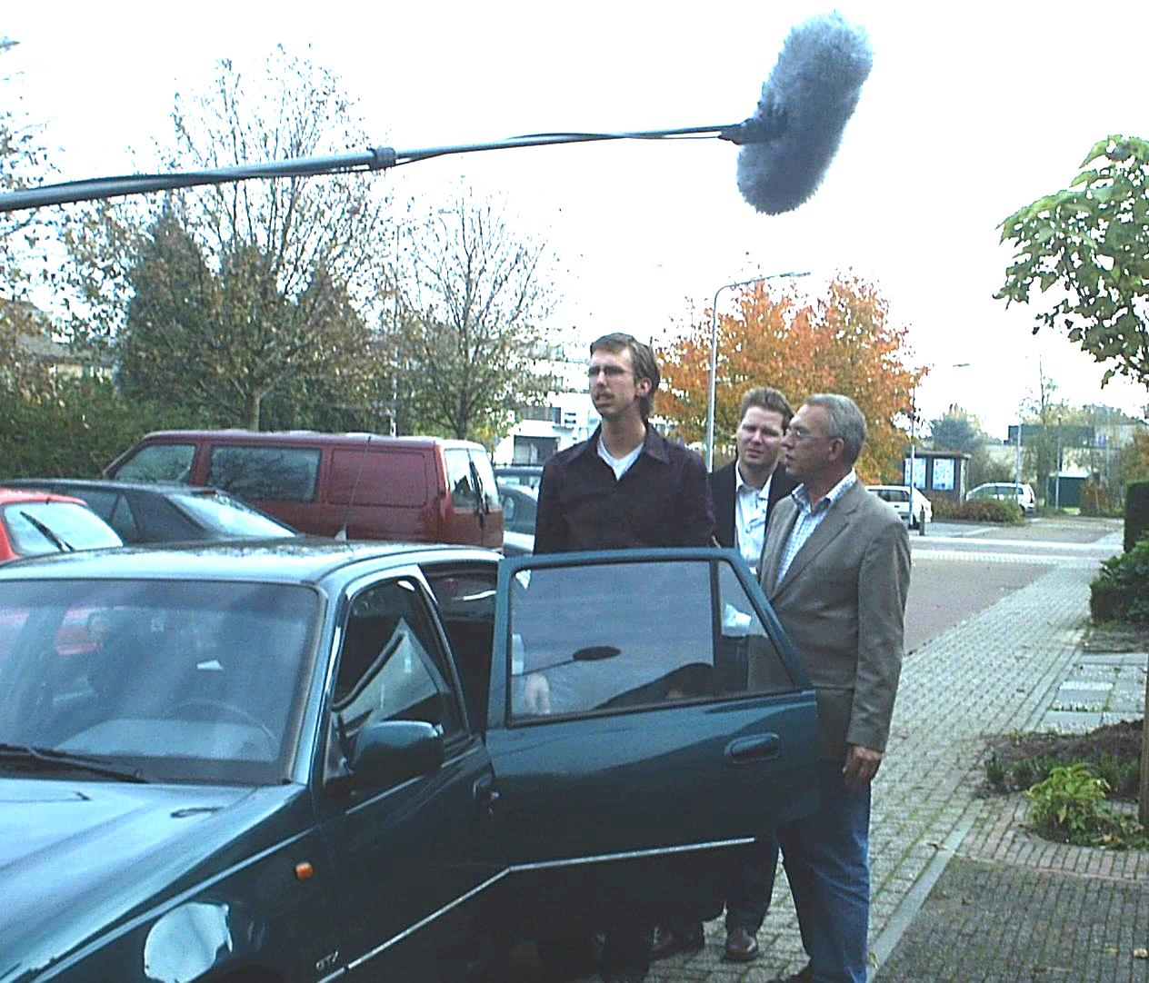 Arijan van Bavel tijdens de opname in 2005 van de aflevering IJskoud van de serie Dossier Gesloten, AVRO, onderdeel van Opsporing Verzocht. Eigen foto Blauwkous, Paul Hermans.